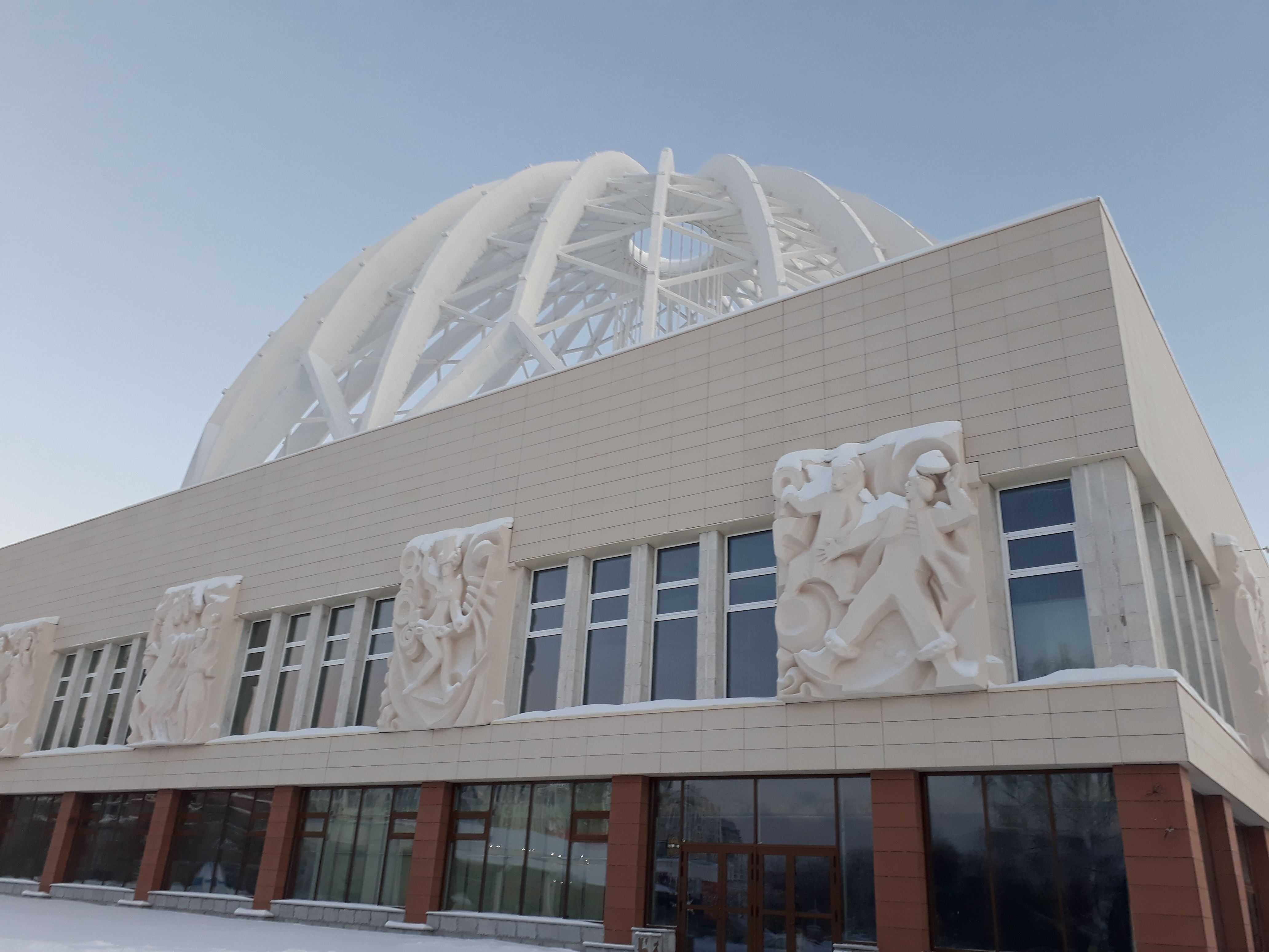 Февраль 2019